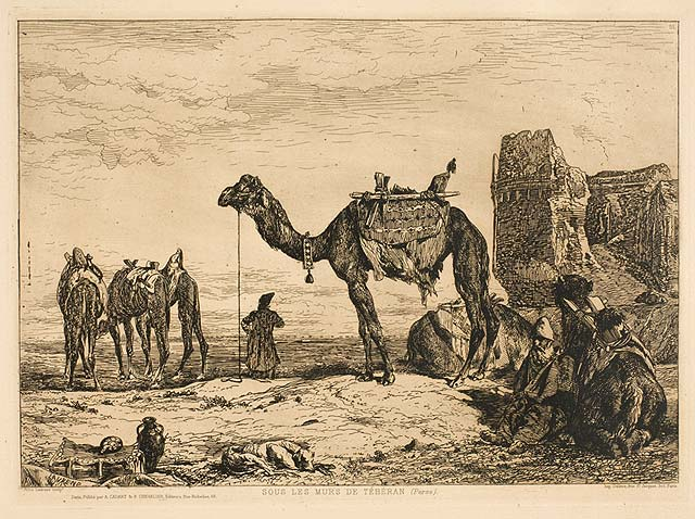 Sous les murs de Téhéran. Gravure.